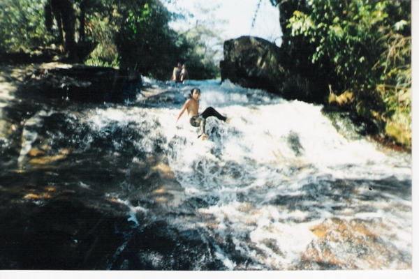 Cachoeira da Boa Esperança em Belo Vale